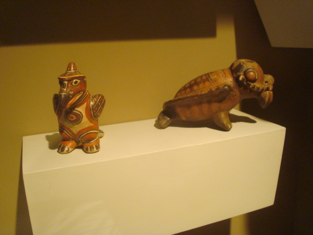 Instrumentos musicales de la cultura de los nicoyas, Costa Rica. Se observa a la izquierda una sonajera con forma de ave, hecha de cerámica policroma, con representaciones de plumaje en sus alas, copete y cola. Posee una perforación en el cuello para colgarla. A la derecha, ocarina de cerámica bicroma, con motivo de ave. Museo del Jade, San José de Costa Rica.